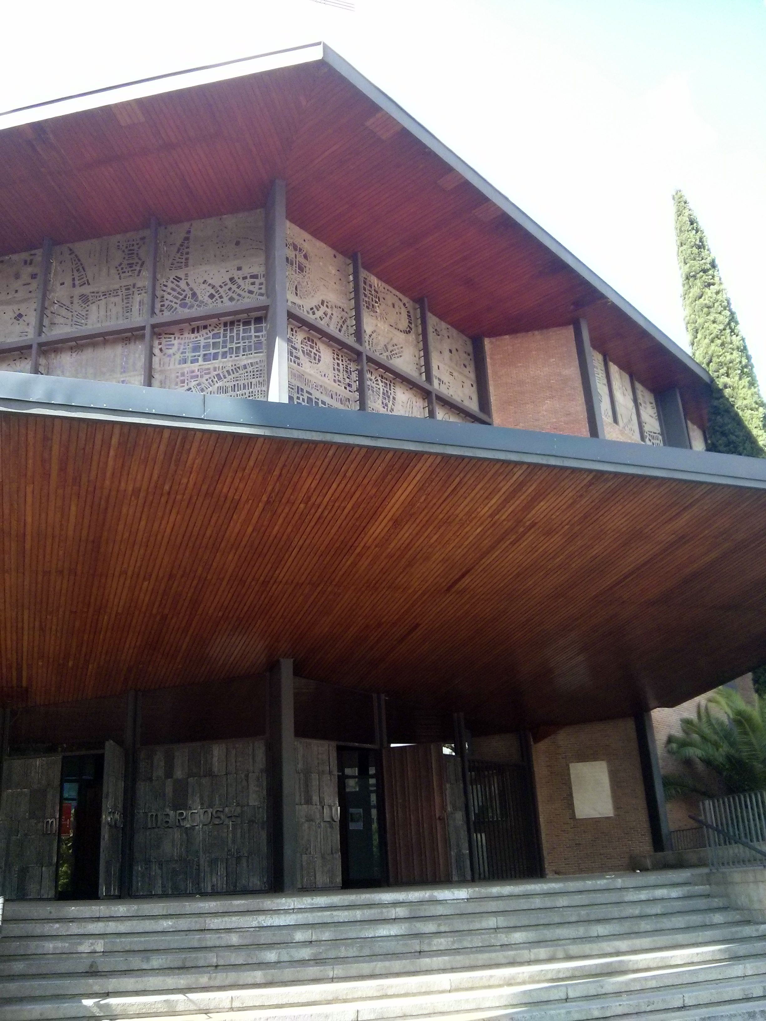 Parroquia de los Sagrados Corazones, Madrid, España.